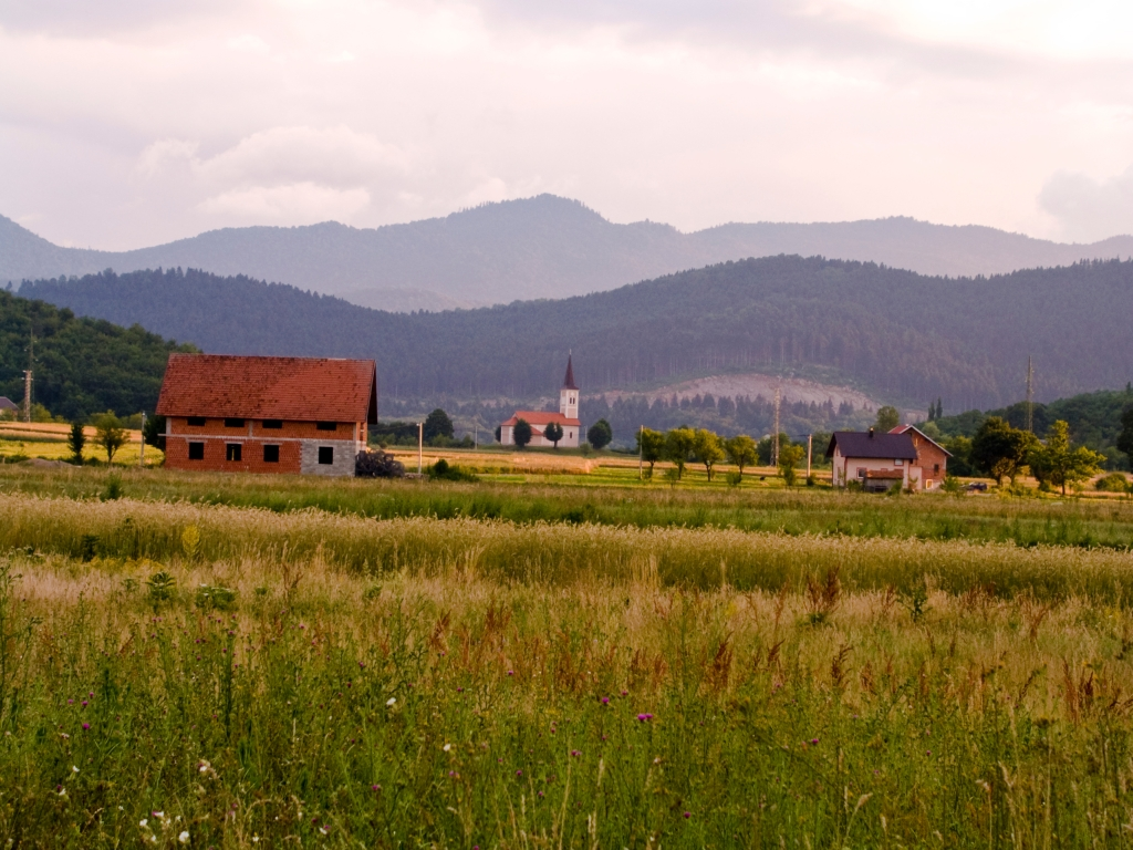 Crkva Sv. Križa u Prozoru kod Otočca